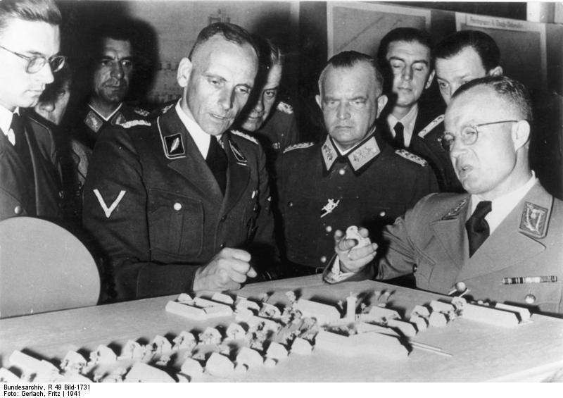 Kattowitz, Gauleiter Bracht, Planung und Aufbau im Osten, 1941. Professor Konrad Meyer-Hetling is at far left.